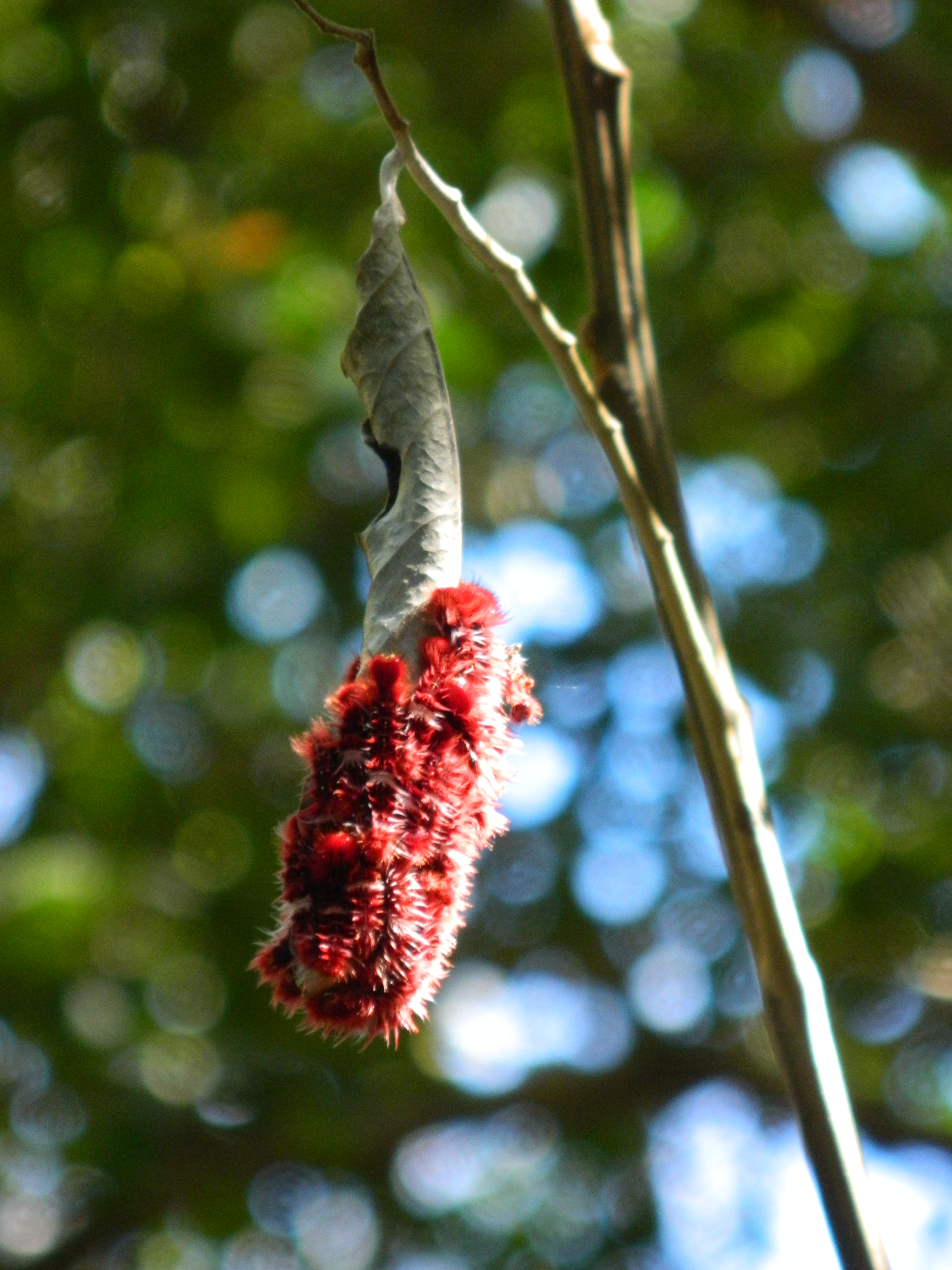 Orugas gregarias, especie Morpho epistrophus, Valle del Lunarejo, Rivera, Uruguay.